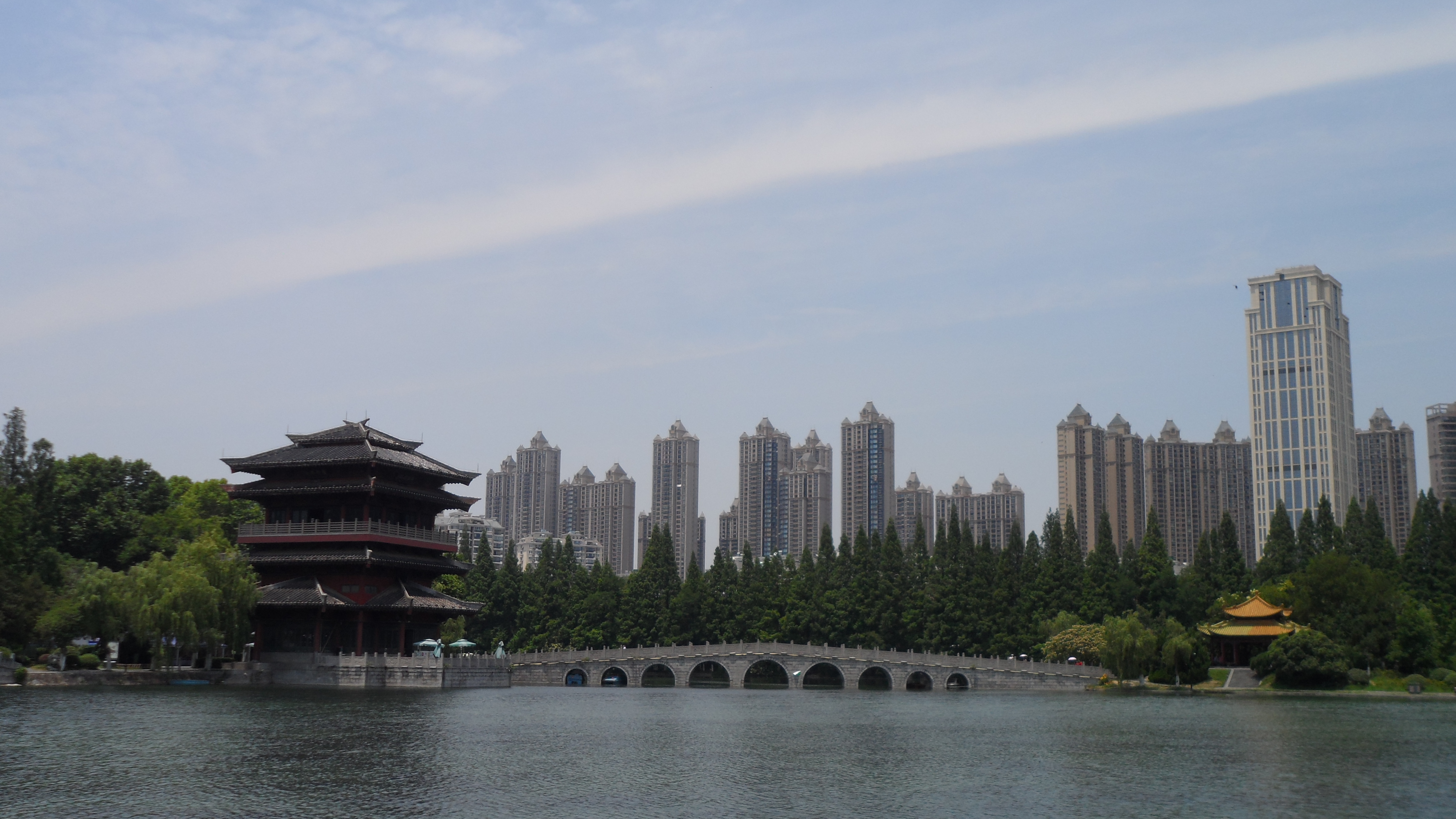 合肥逍遥津公园